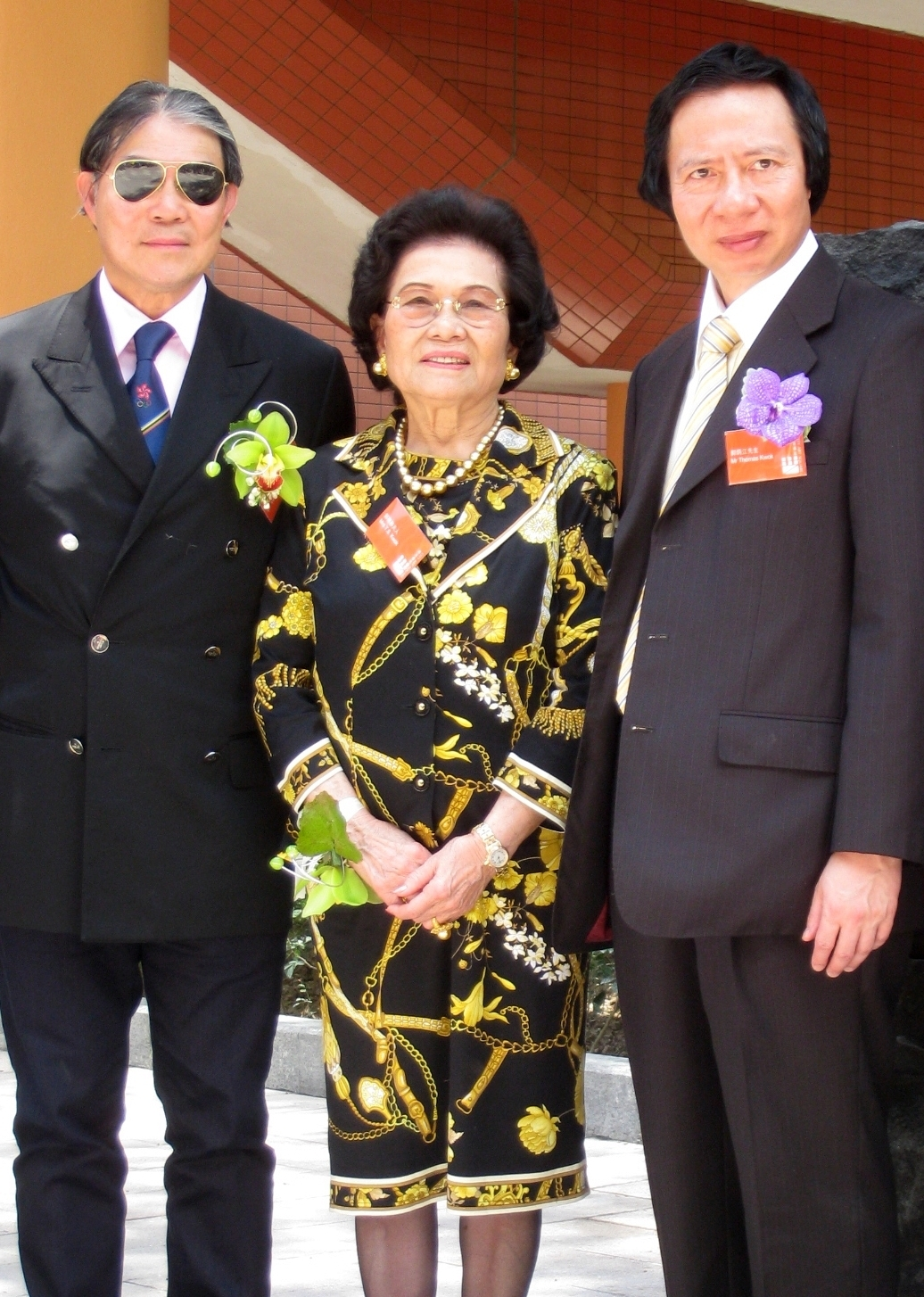 Kwong Siu Hing & Thomas Kwok 鄺肖卿和郭炳江